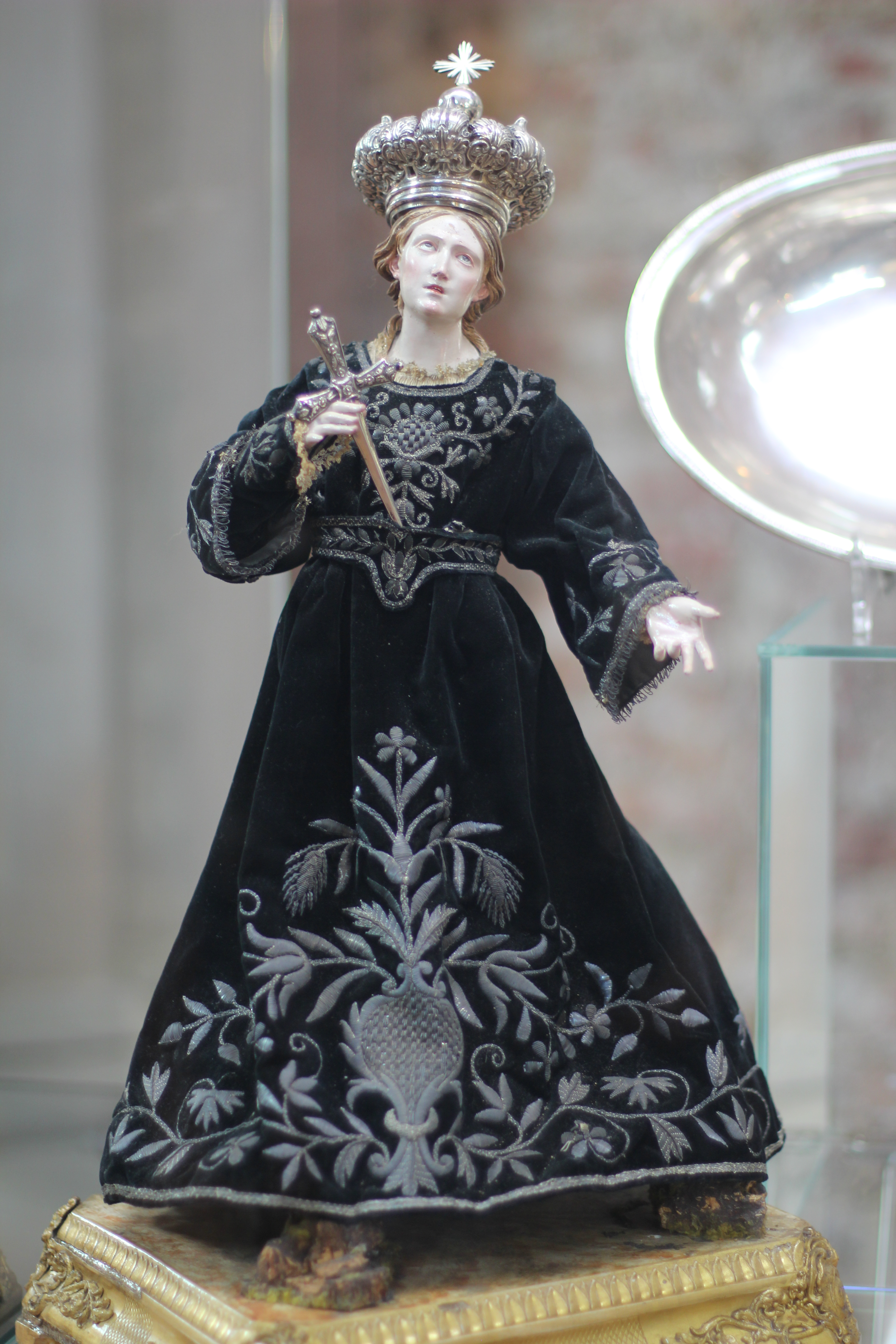 Madonna addolorata: scultura in legno rivestita di tessuto ricamato con fili d’argento, ambito napoletano, secolo XVII. Dono in memoria e ricordo di madre Fiorina Cerrato, superiora delle Figlie della Sacra famiglia Opera Isnardi